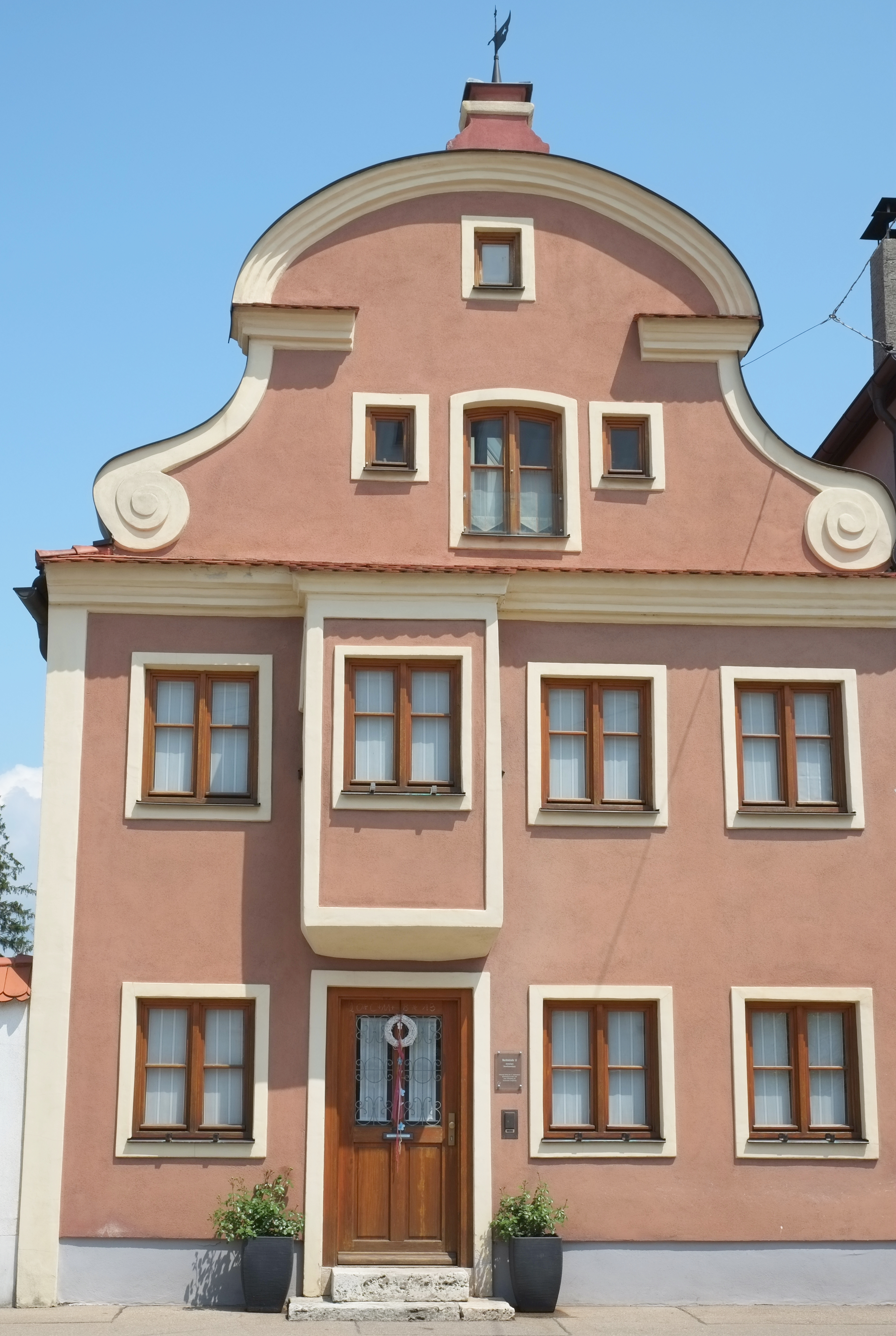 ehemaliges Benefiziatenhaus, Marktstraße 13, in in Rennertshofen im Landkreis Neuburg-Schrobenhausen (Bayern)